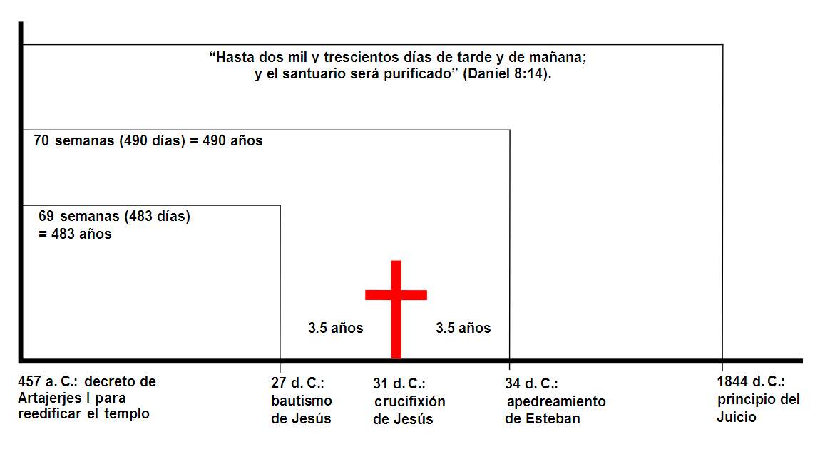 El día de la expiación. «Y él dijo: Hasta dos mil trescientas tardes y mañanas; luego el Santuario será purificado”» (Libro de Daniel 8:14)